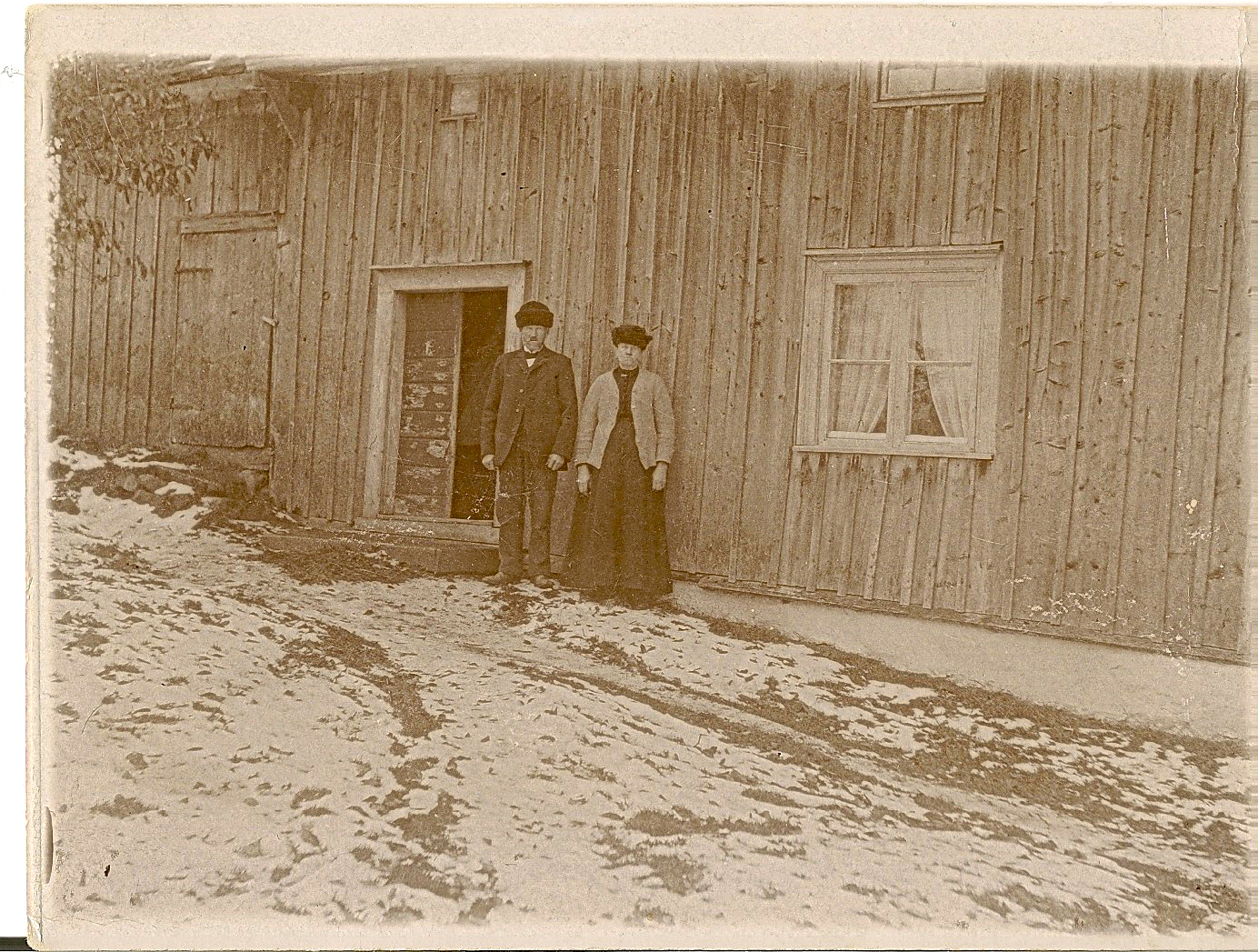 Ett par står framför en gammal byggnad på gården Knutstorp i Hakarp.